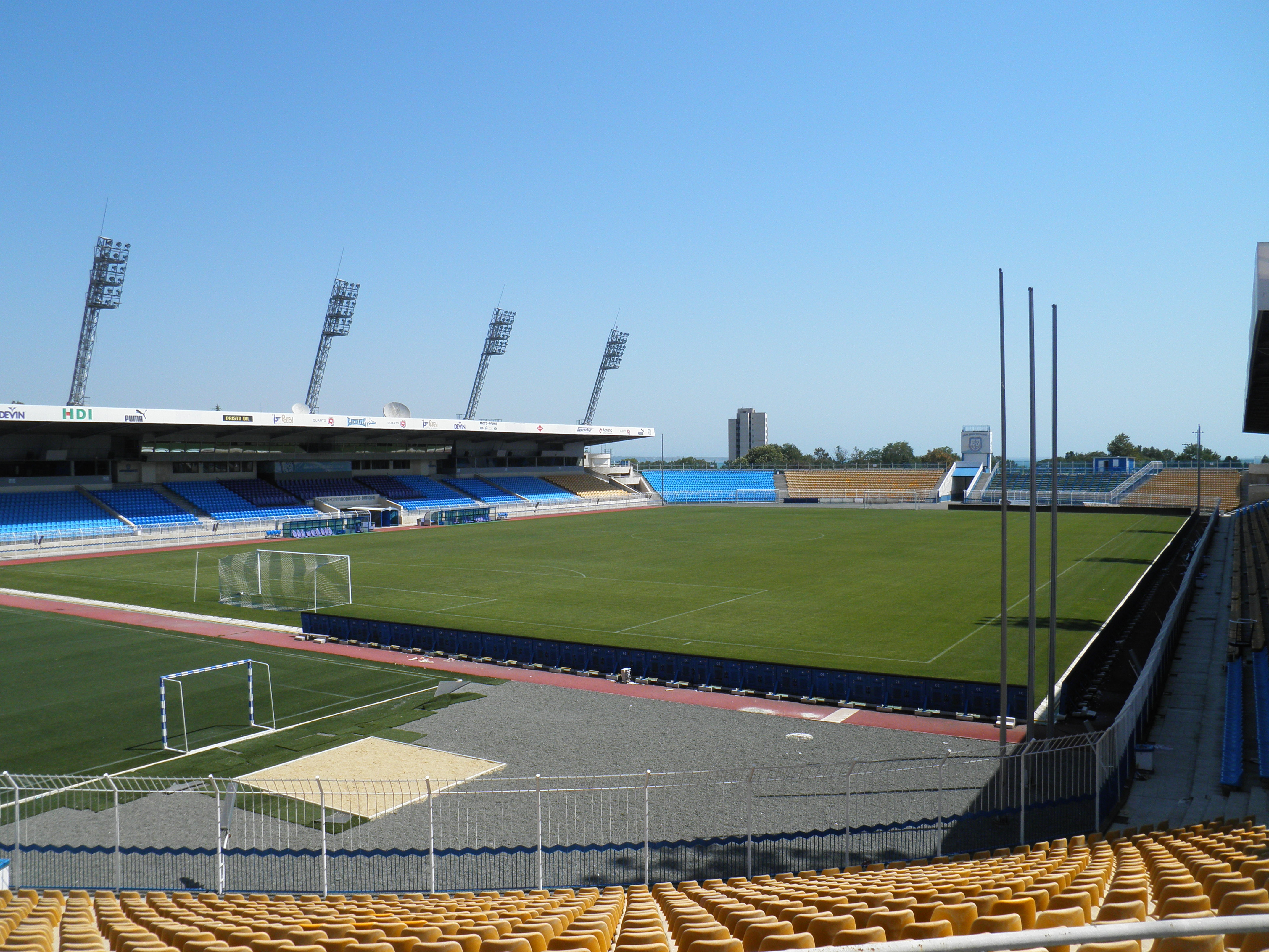 Stadion Černomoreca